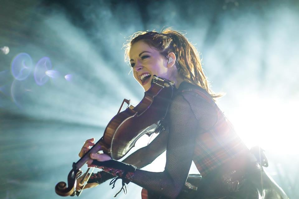 Stirling actuando en Guadalajara, México en 2015